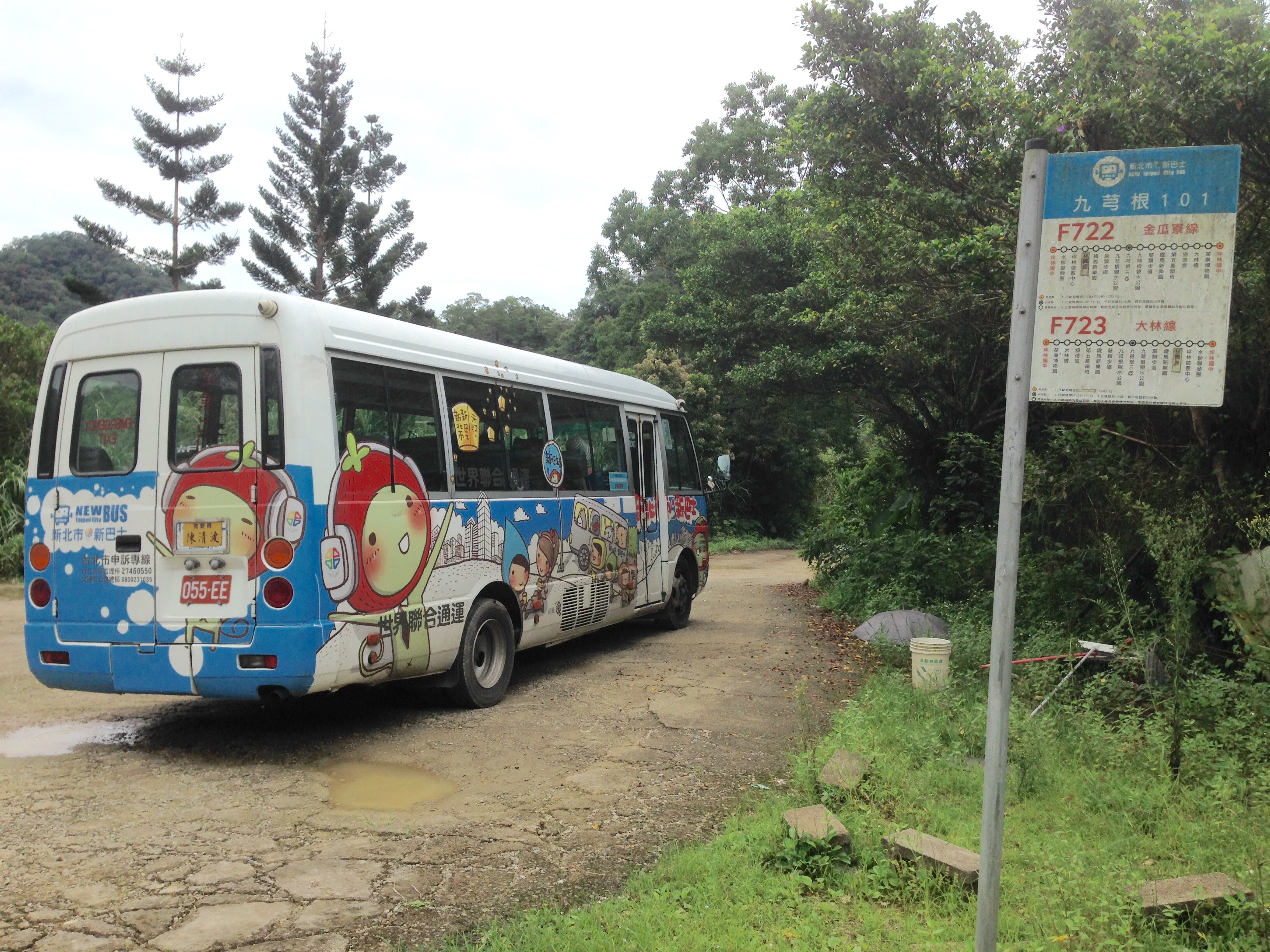 中文（台灣）: 世界聯合通運Fuso Rosa中型巴士055-EE，與新北市新巴士F722、F723路「九芎根101」站牌。